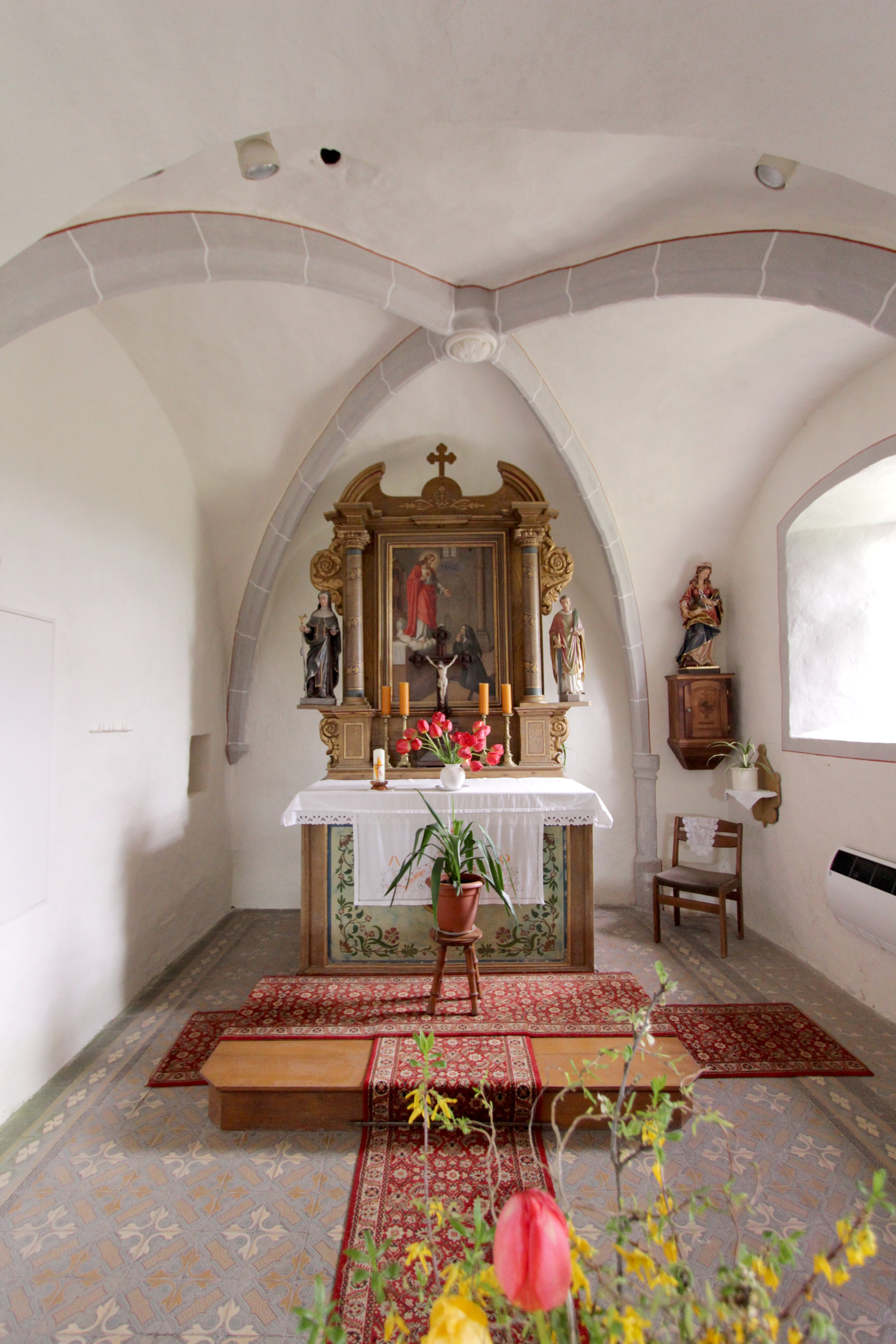 54673 Krautscheid, Kapellenstraße 1. Zweiachsiger Saalbau mit Chorturm, im Kern wohl romanisch (spätgotischen Rippen, Rundkonsolen und Wandsäulchen). Das einfache Schiff erhielt eine Holzlehmdecke mit Voute. Der einfache hölzerne Säulenaltar d. 18. Jahrhundert zeigt ein großes Mittelbild und seitliche Konsolen für die Figuren der heiligen Apollonia und Gertrud. Aufnahme von 2018.